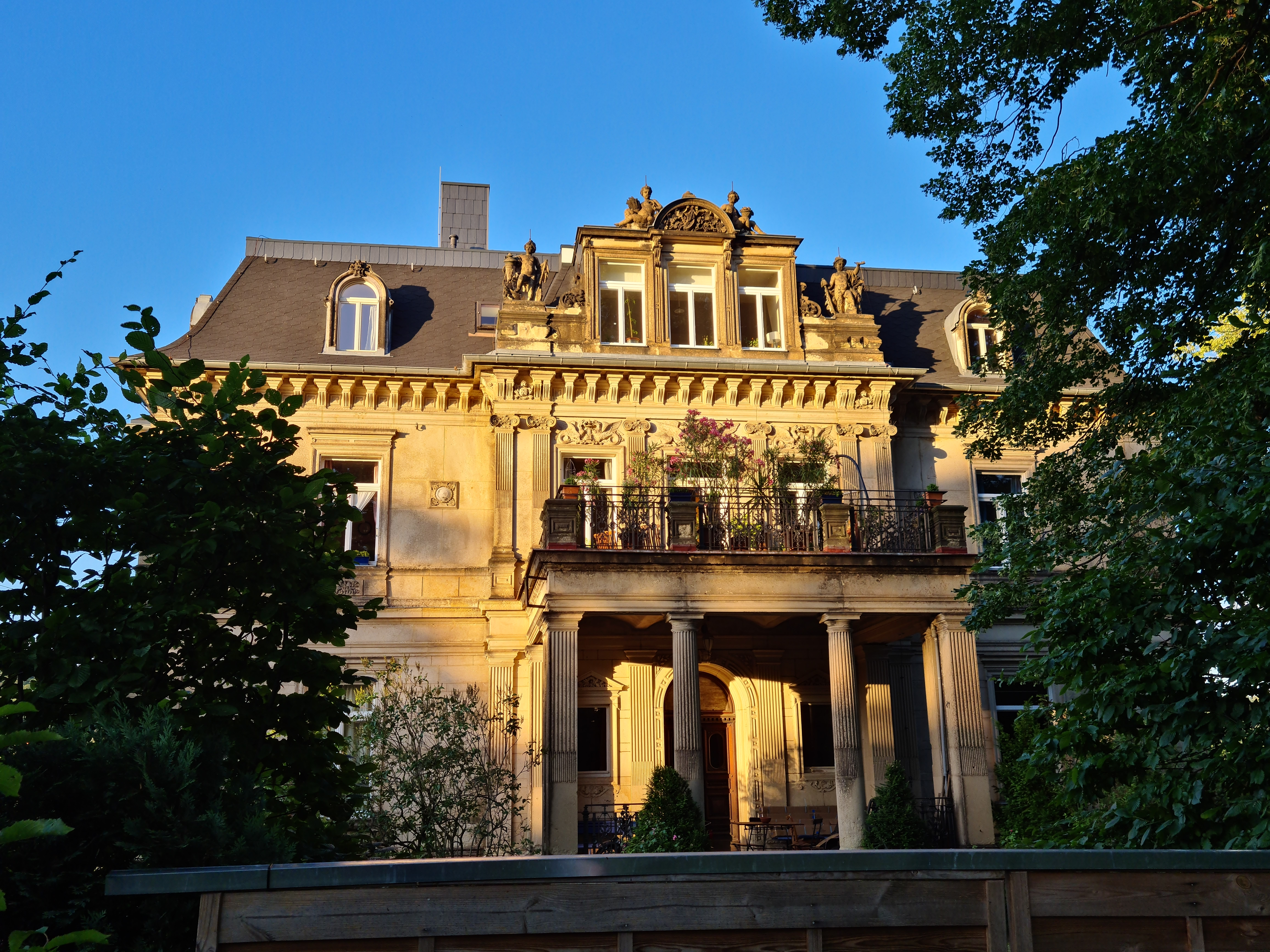 Blick Elbabgewandte Seite // Bild Juni 2019 // Ausführung 1875: Acht Sandsteinfiguren für die Villa Hartmann in Dresden Laubegast: Die streng symmetrische Villa, deren Fassaden vollständig aus Sandstein ausgeführt wurden, ist fünfachsig aufgebaut, wobei drei Fensterachsen die Mittelrisalite bilden. Diese werden durch Dachausbauten mit Sandsteinfiguren zusätzlich betont. Die Sandsteinfiguren wurden von Prof. Rentzsch entworfen und vom Bildhauer Franz Schwarz ausgeführt.